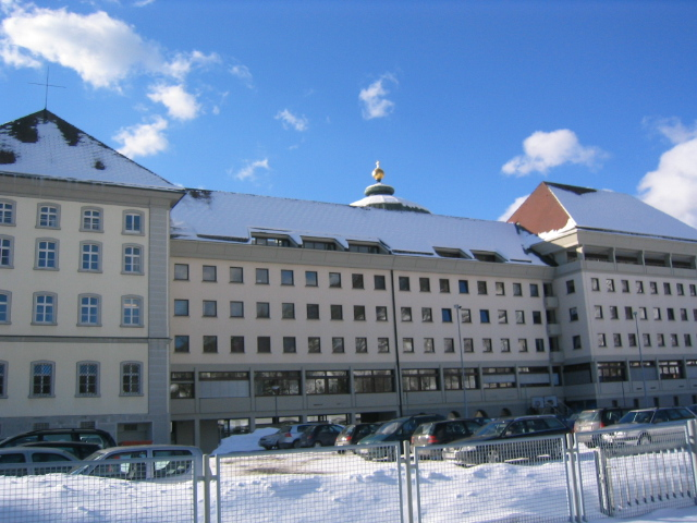 Neubaufront des Kollegs St. Blasien (Ostflügel), selbst fotografiert (EBB)